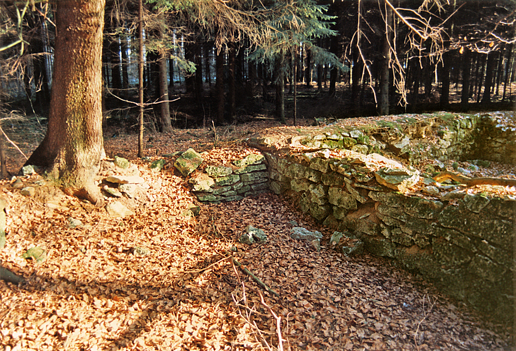 Der Limeswachturm 14/55. Deutlich sichtbar ist die Naht vom Turm zur nachträglich angebauten Limesmauer. Rätischer Grenzverlauf, Bayern.